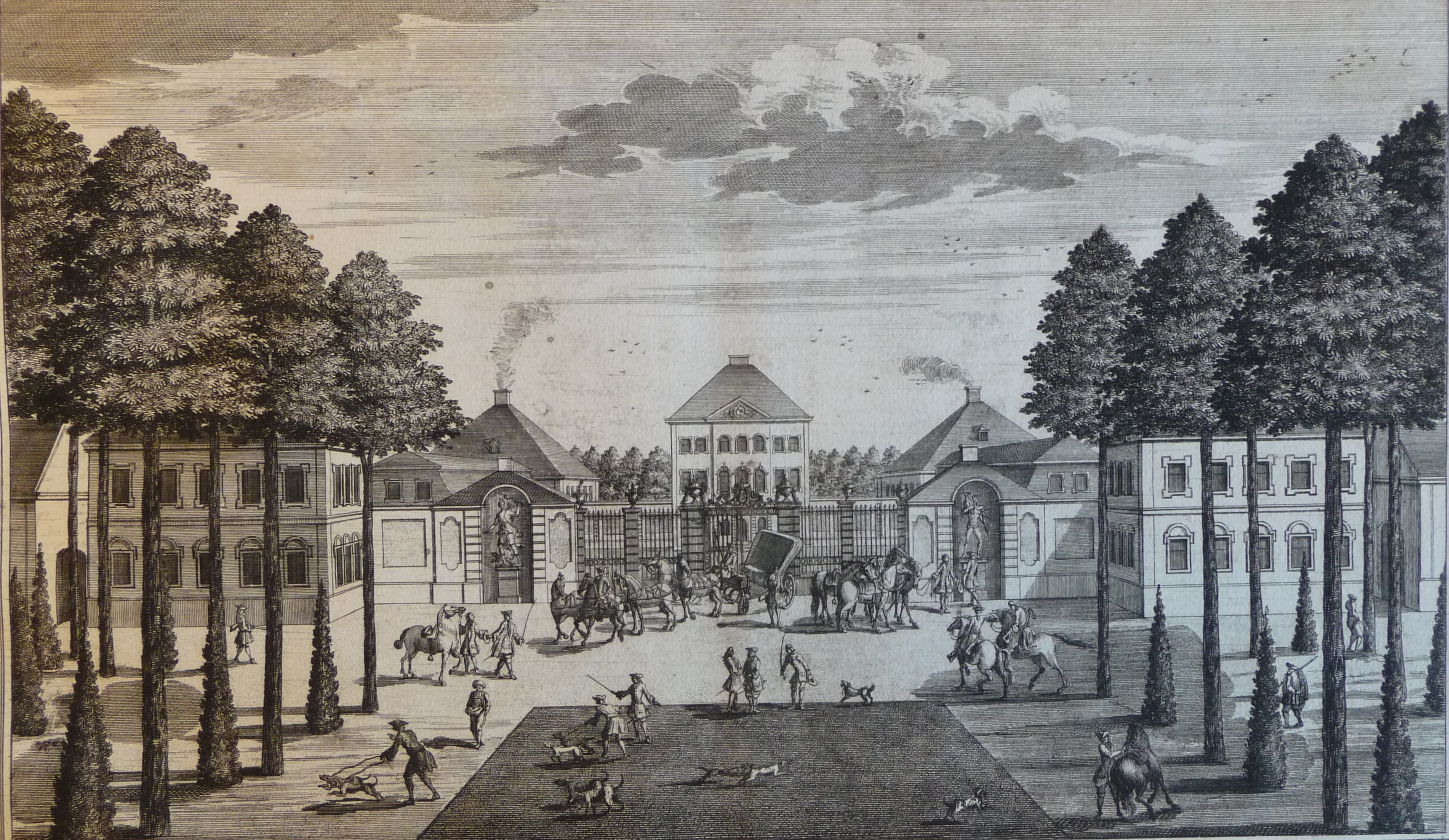 Schloss Fürstenried: Einfahrt zum Schloss.